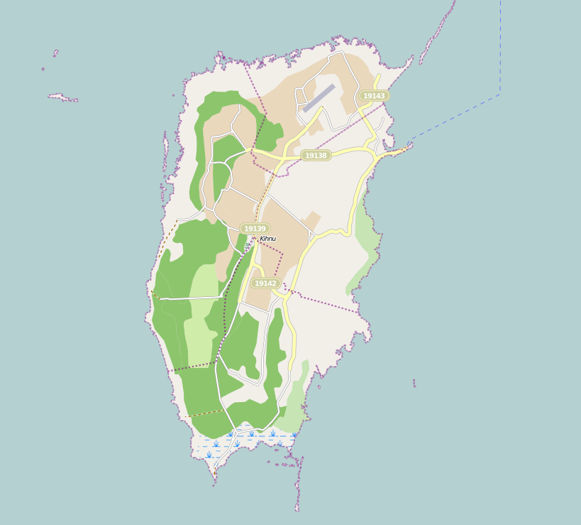 Harta Insulei Kihnu, Estonia